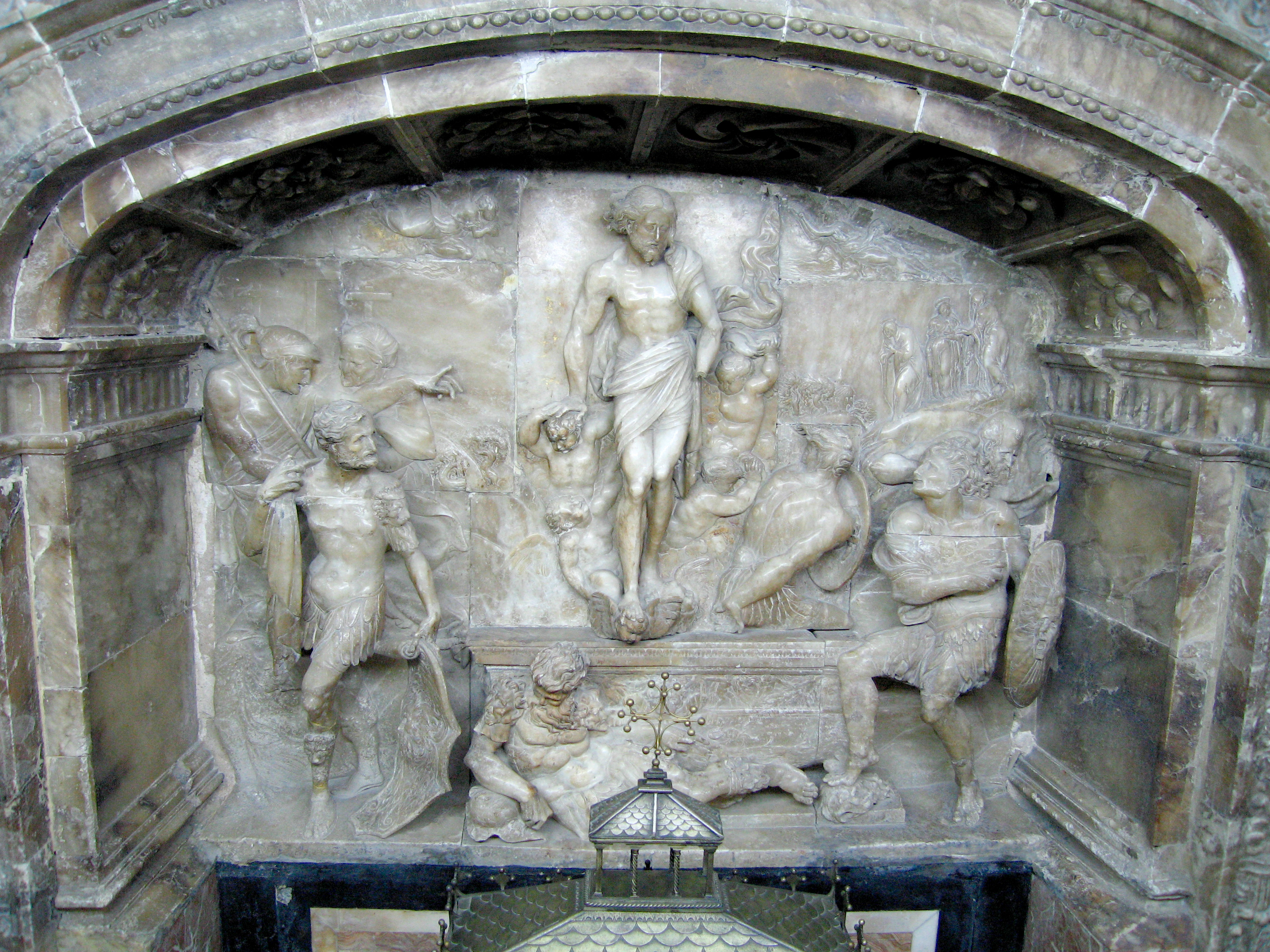 Capella Borja a la Seu de València